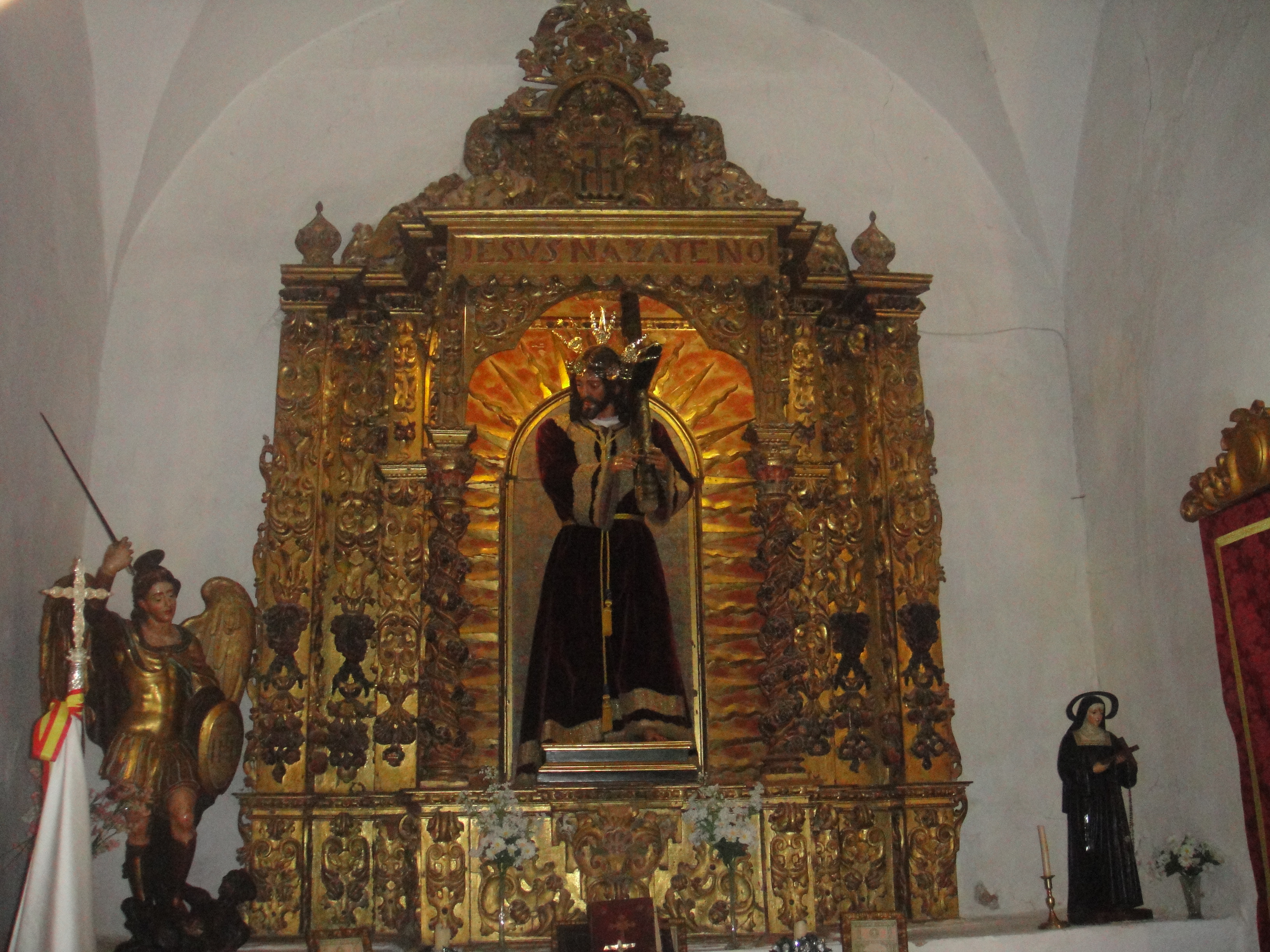 Retablo e imagen de Ntro. Padre Jesús Nazareno. Ermita de Jesús Nazareno de Fuente Obejuna, provincia de Córdoba, (España).